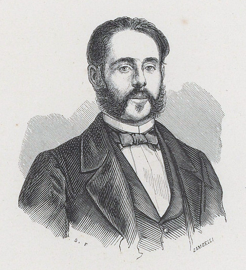 Ritratto di Tomaso Agudio